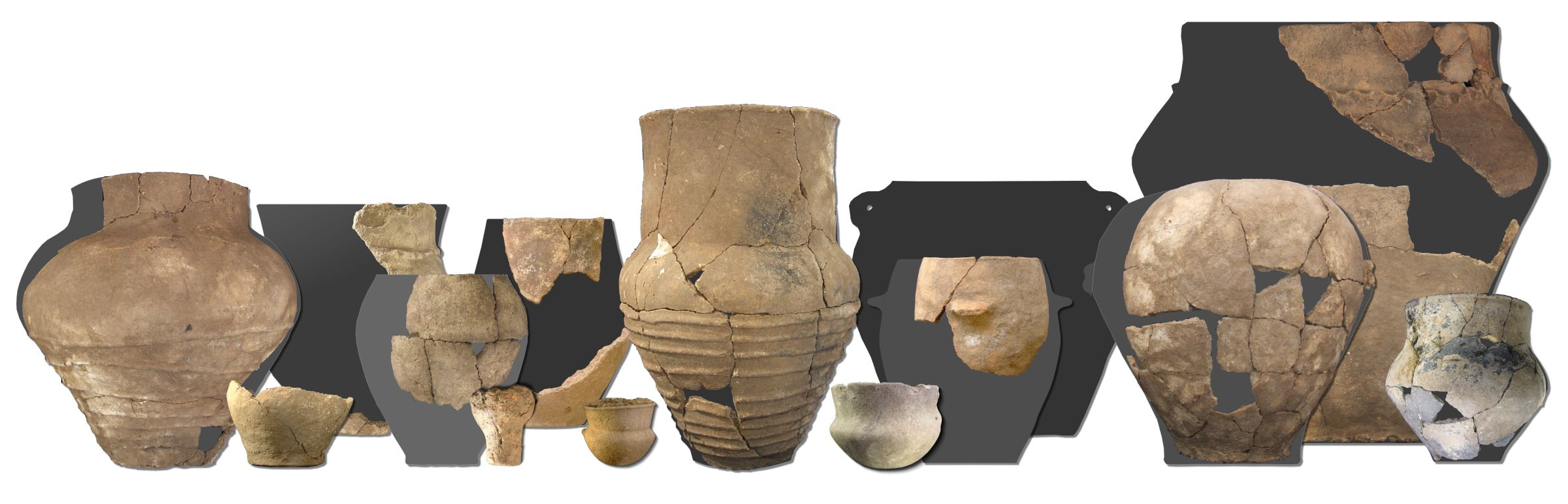 Diversos vasos cerámicos localizados en el Tossal de la Vila